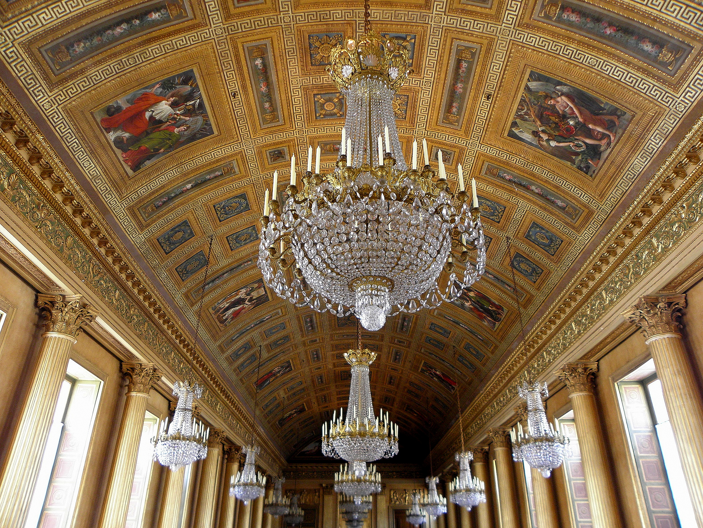 Salle de bal du château de Compiègne (60). .